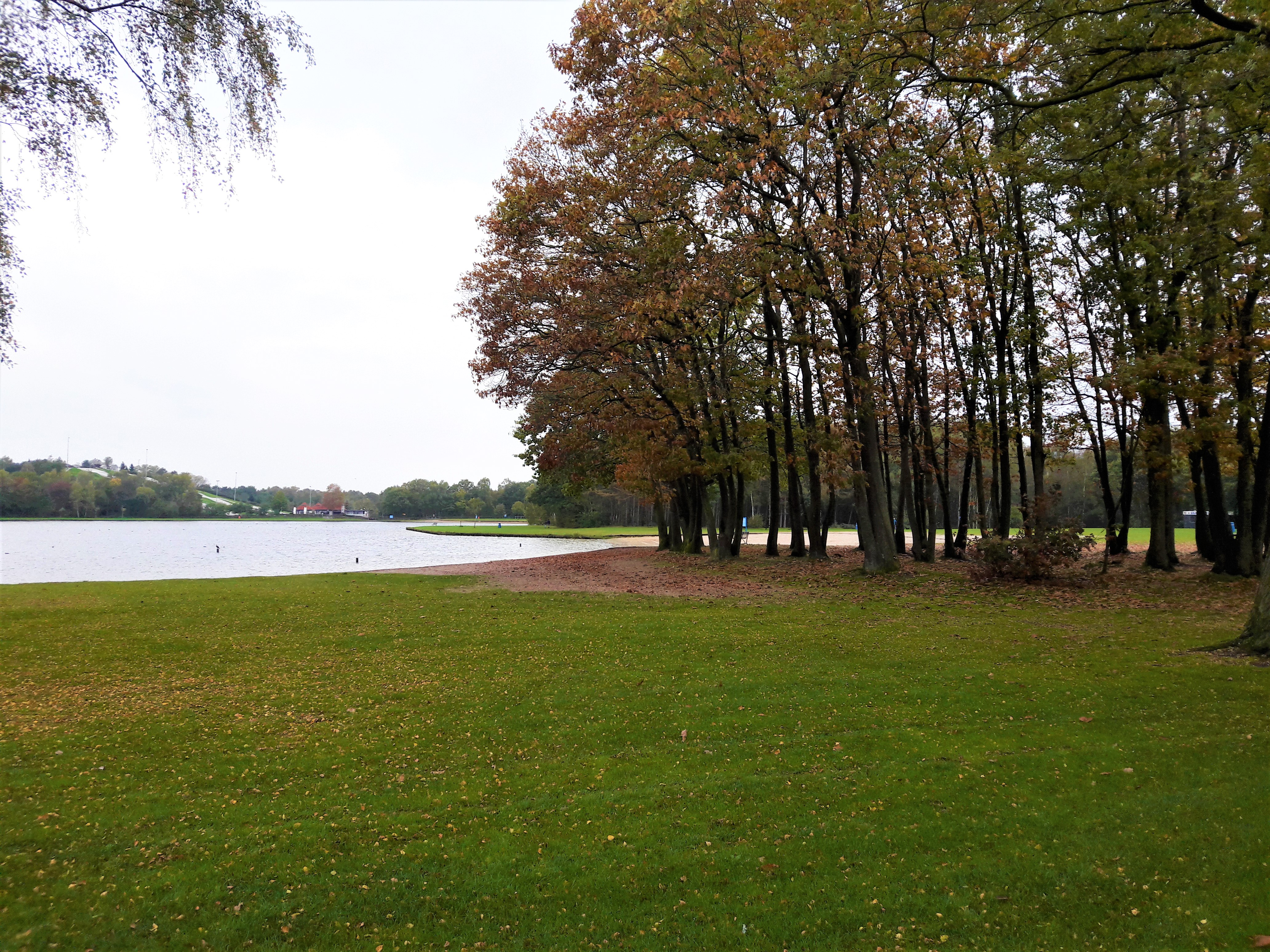 Herfstbeelden van Het Rutbeek, met op de achtergrond de zwemplas en de skiheuvel van Skicentrum Moser.